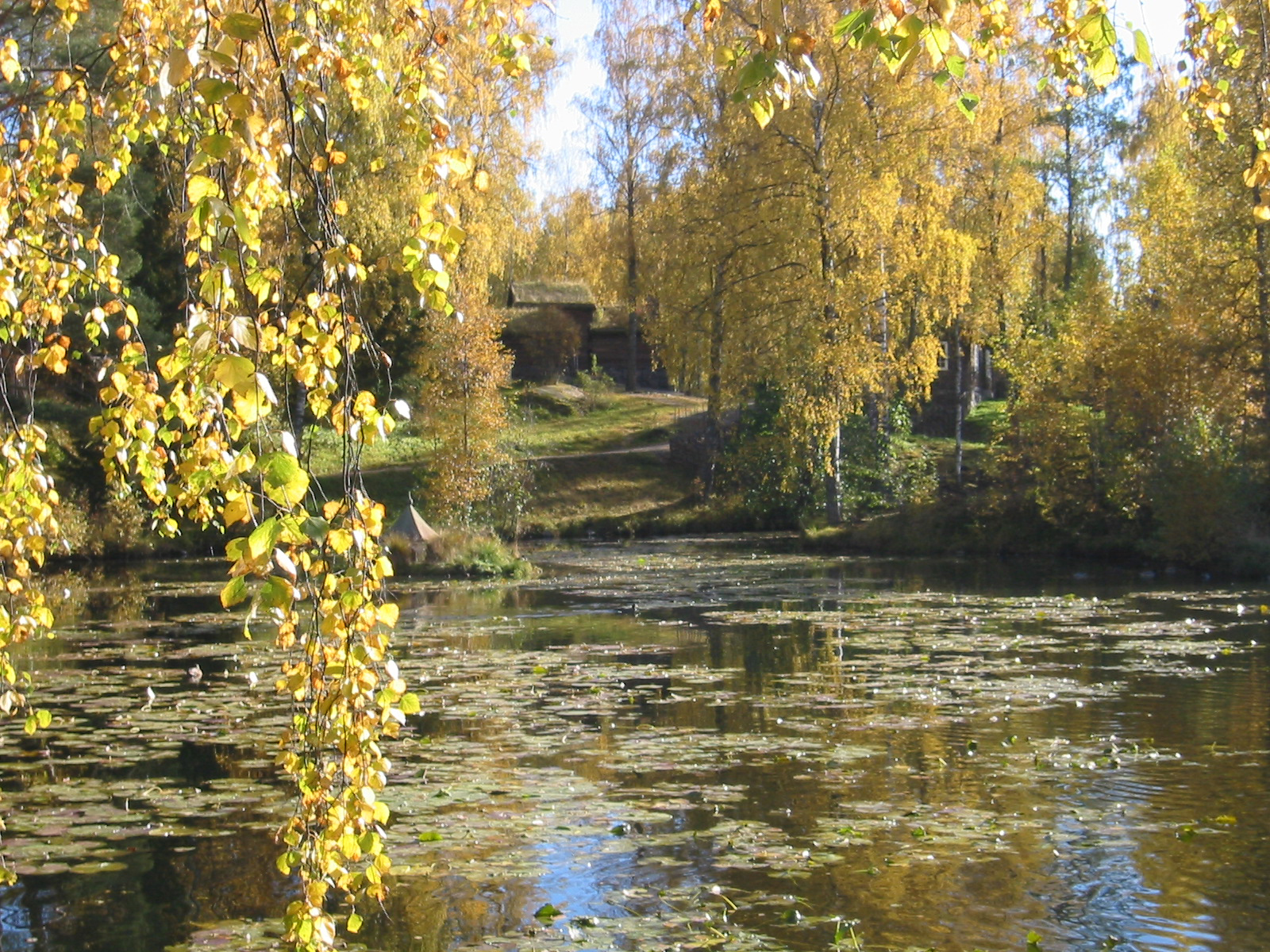 Nordre tjern på Maihaugen, Lillehammer